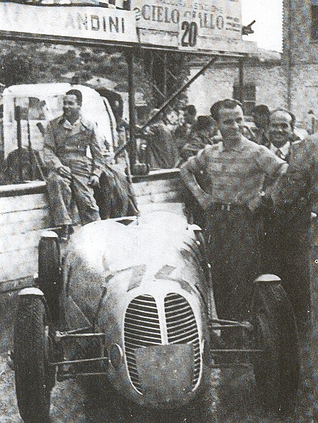 bandini 1100 siluro con Ilario e Gualtiero Bandini